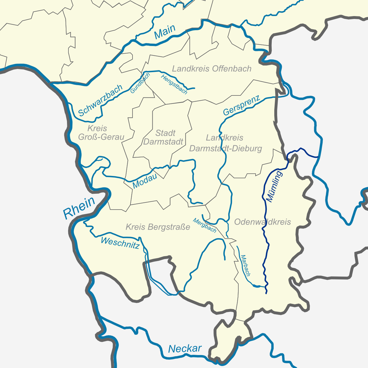 Verlaufskarte der Mümling in Südhessen